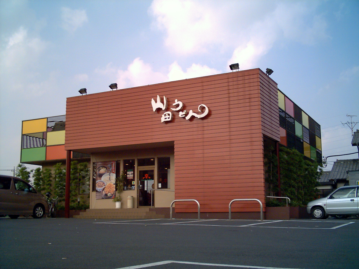 yamada-udon_Restaurant_japan photography day, 2006.10.31. photography person kici 山田うどん